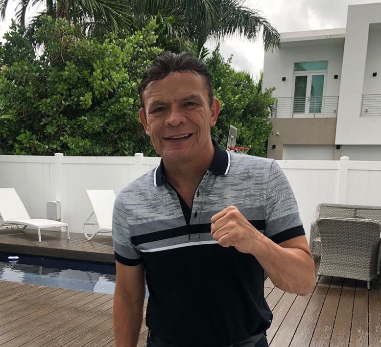 Boxeador Daniel Zaragoza